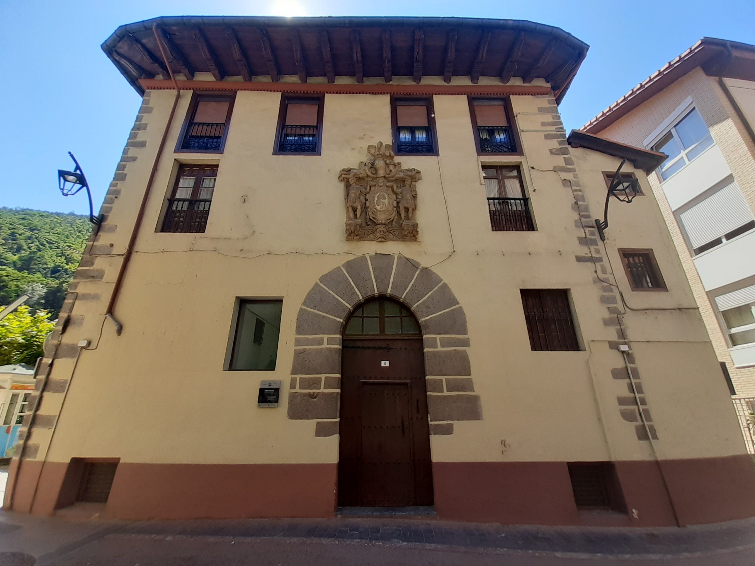 Soraluzeko ikuspegiak: Deba ibaia, kaleak eta etxeak